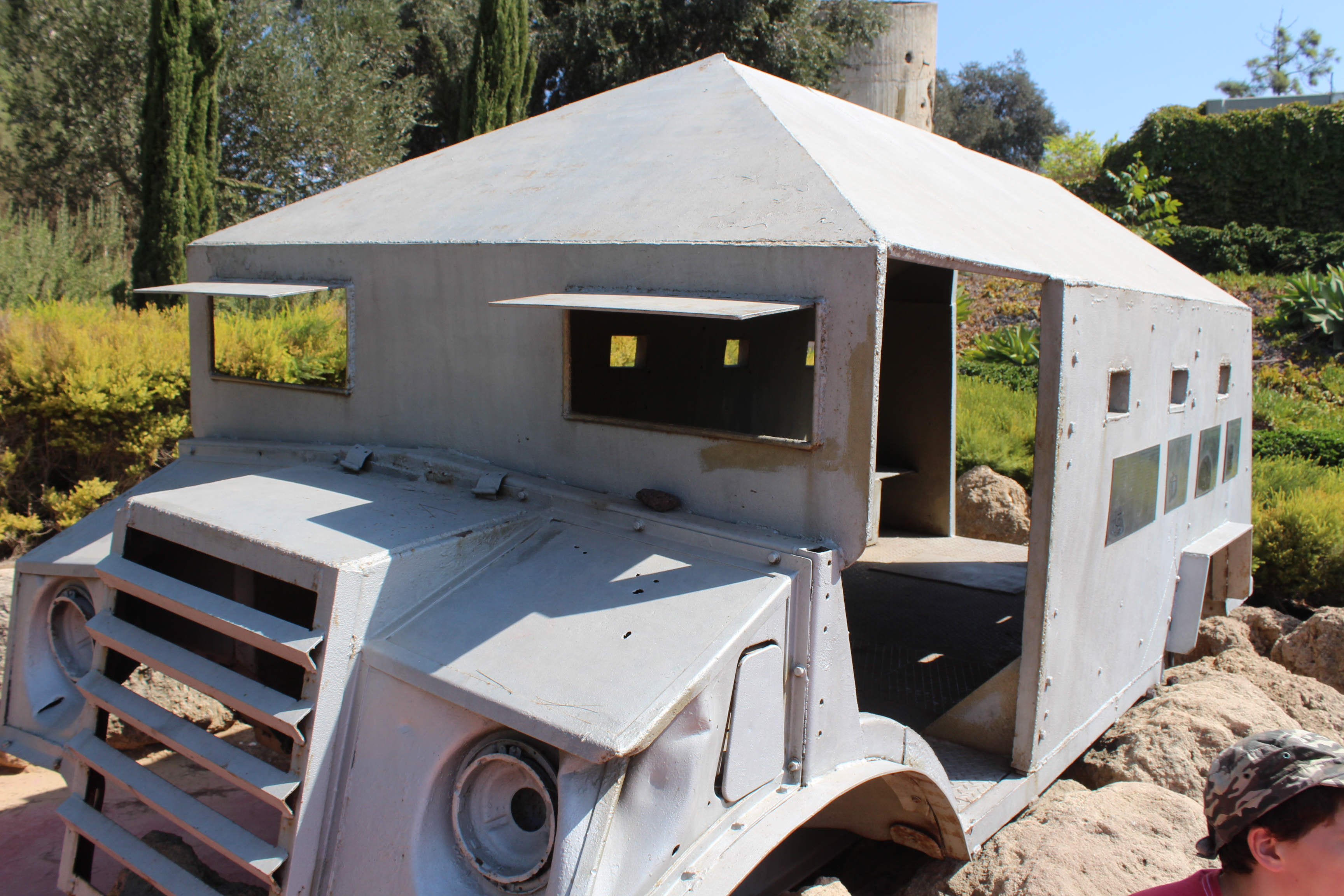 אתר המשוריין לזכר מבצע תינוק